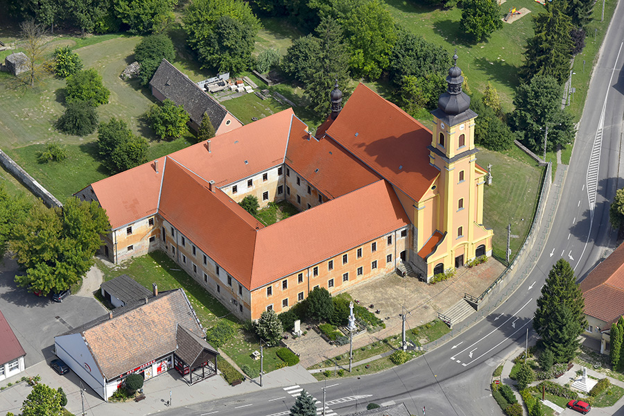 Az andocsi templom és kolostor légi fotón